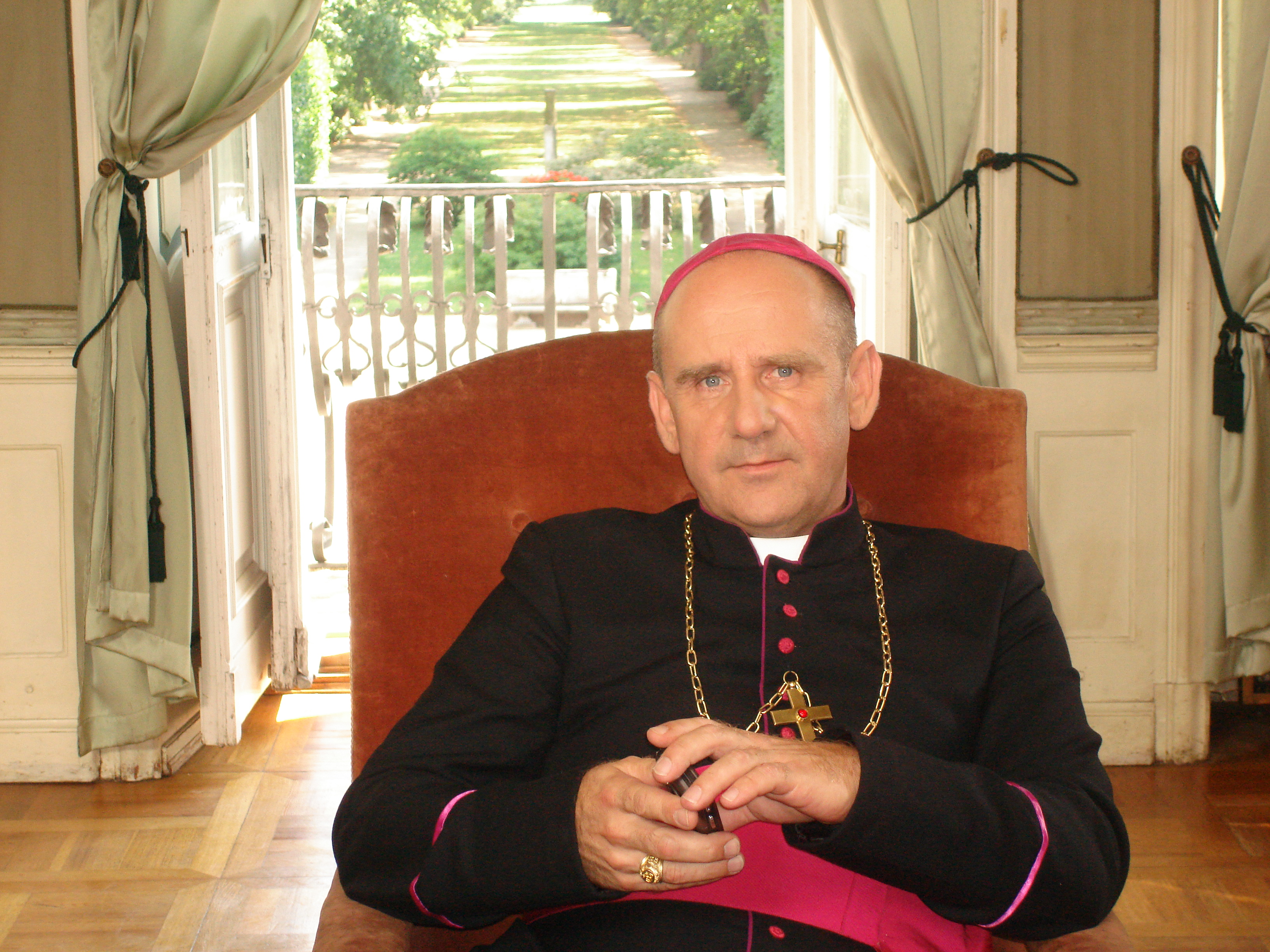 Sławomir Orzechowski w roli Biskupa